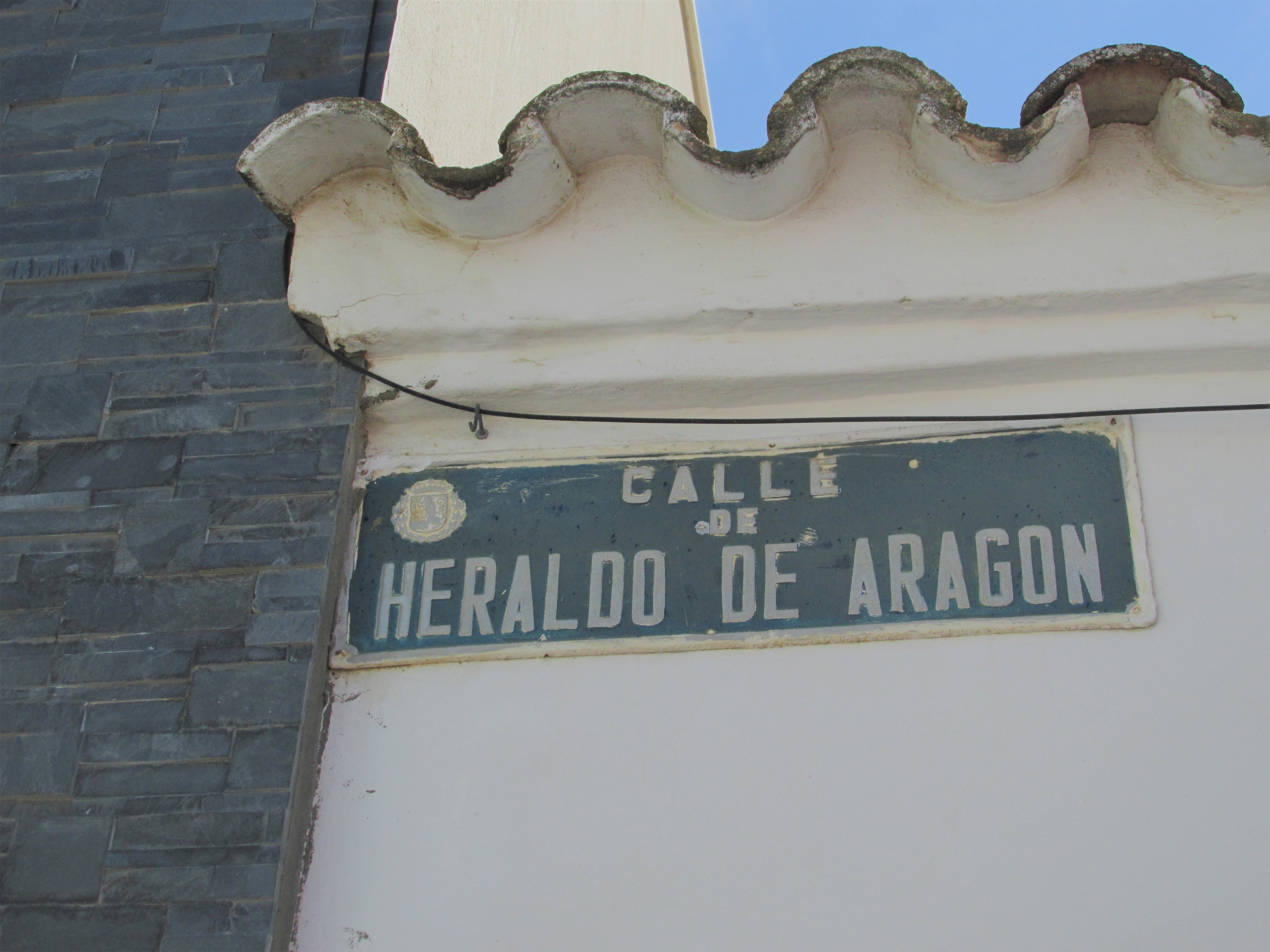 Placa de la calle Heraldo de Aragón. Barrio de Valdefierro.